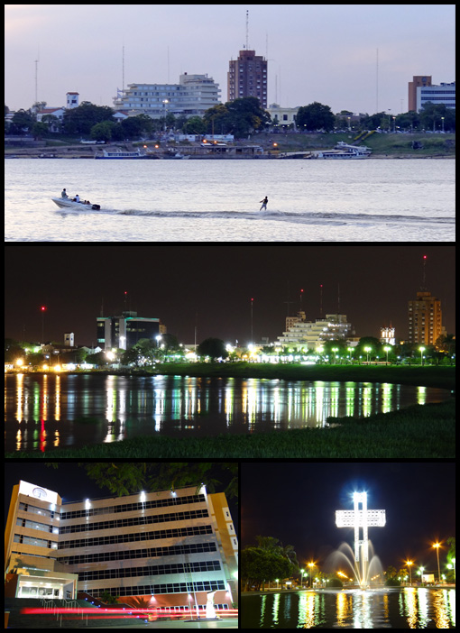 Ciudad de Formosa